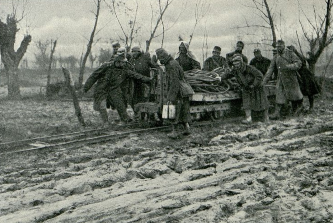 Beim Bau einer österreichisch-ungarischen Feldbahn bei Rača in Macva (Serbien), Phot. Kilophot, Wien